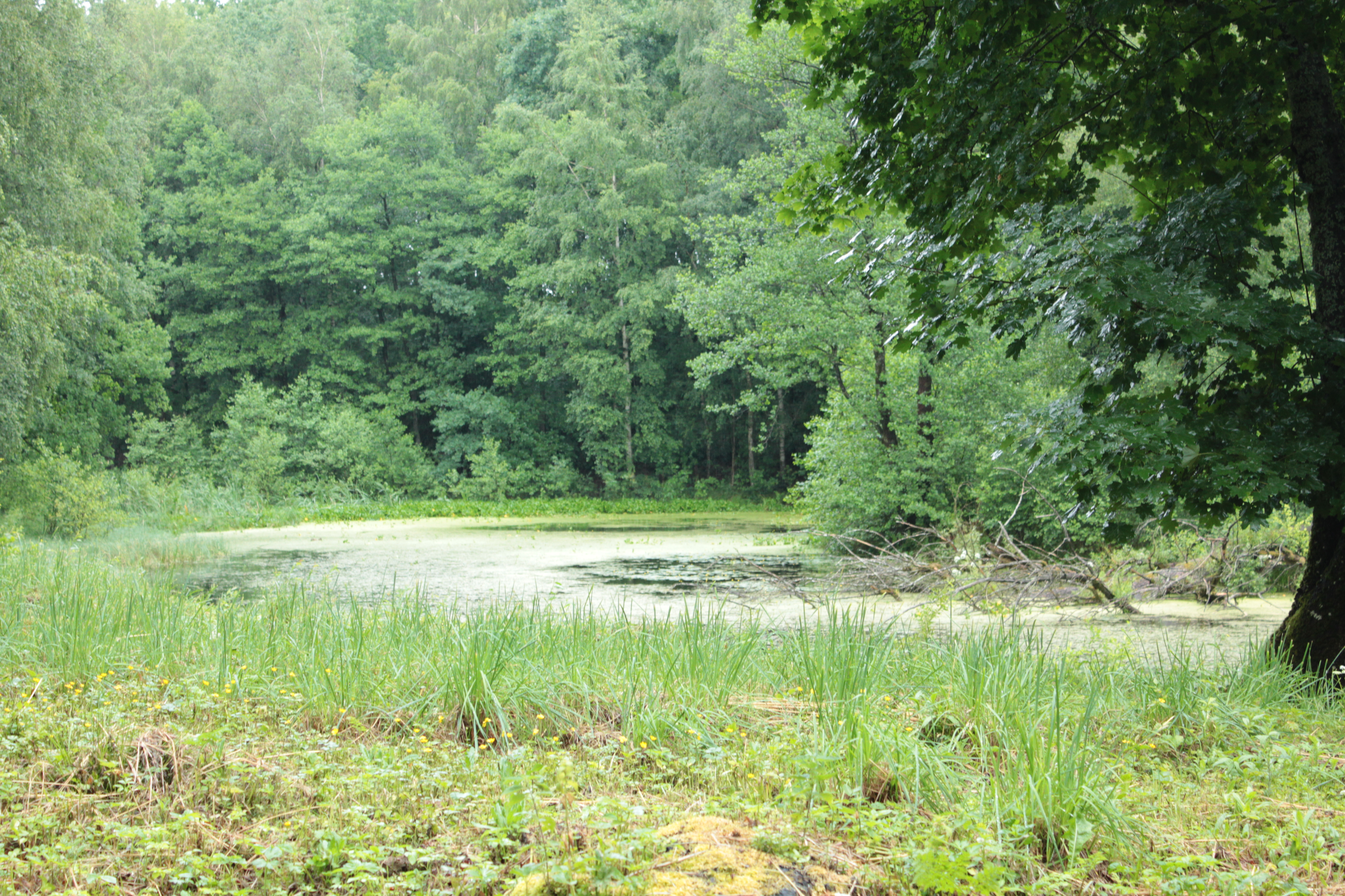 Staw przy pałacu w Poganicach